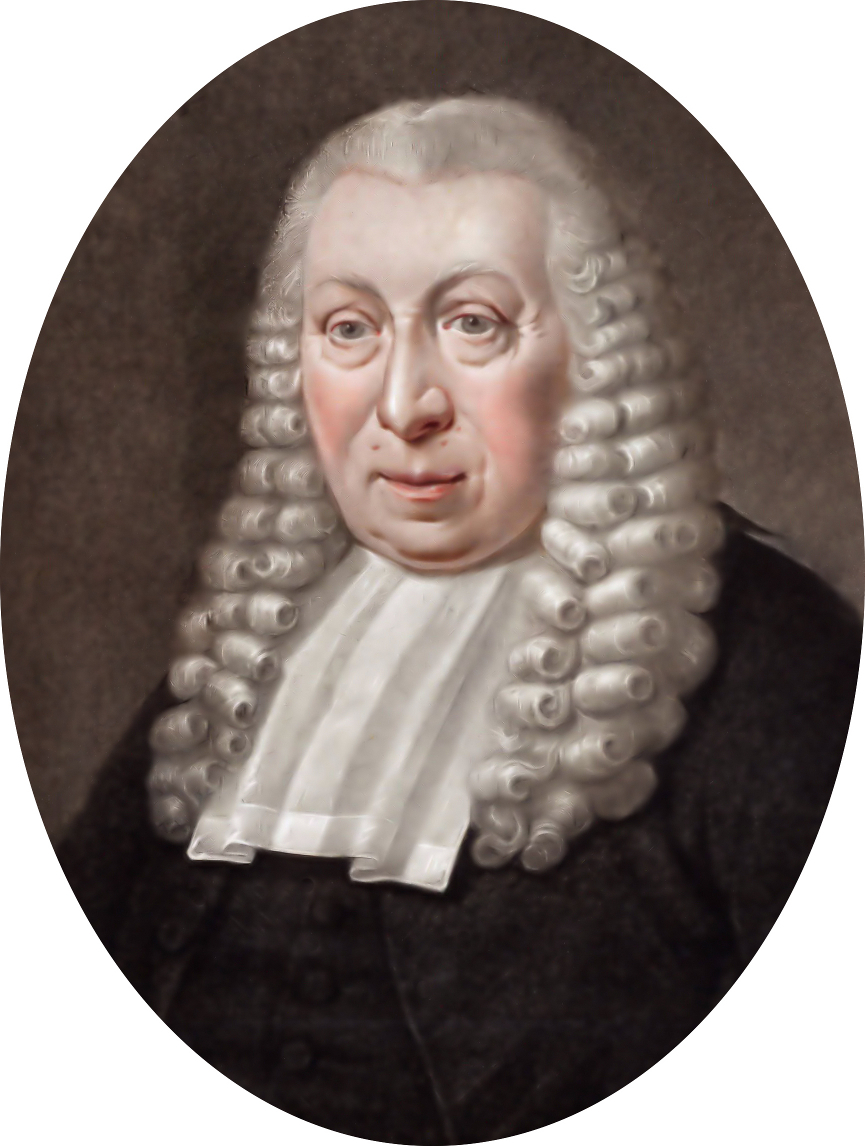 Hendrik Danielsz. Hooft (1716-1794) Schepen en burgemeester van Amsterdam. Afmetingen: 531x422 mm.